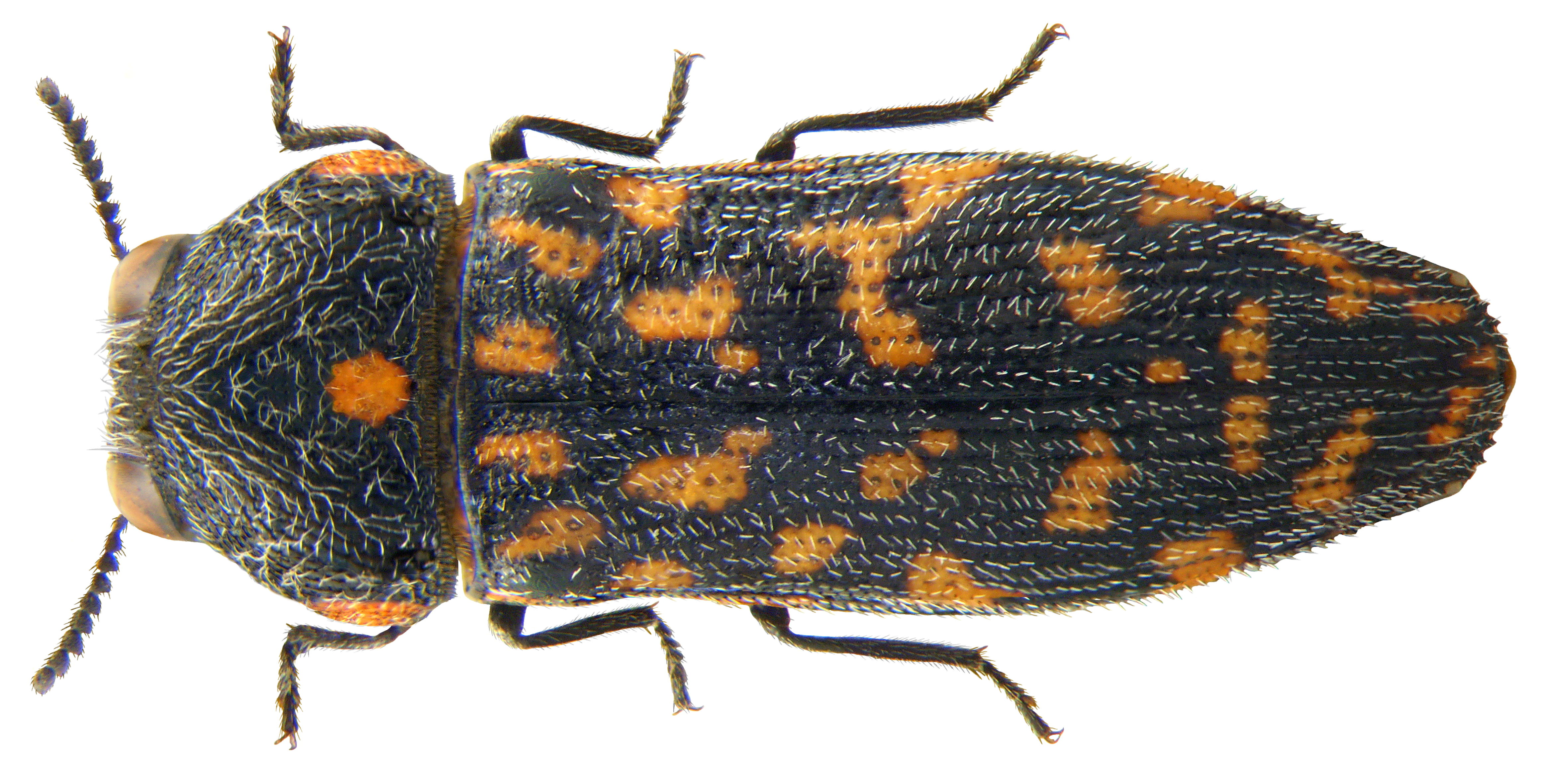 Familie: Buprestidae Groesse: 7 mm Fundort: Namibia, , Outjo, Okaukuejo leg. U.Schmidt, 1994; det. Mühle Foto: U.Schmidt, 2009